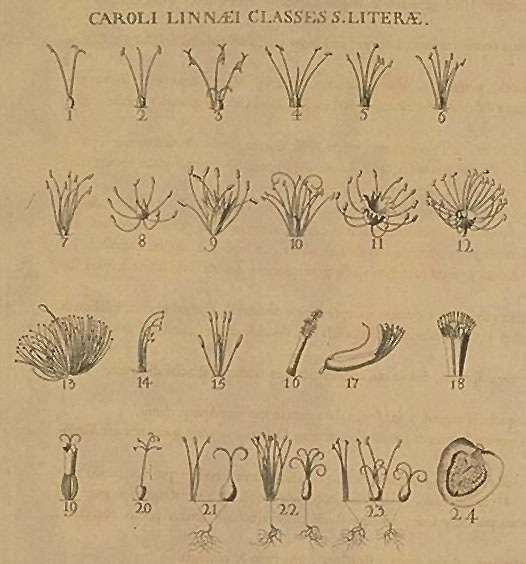 Ehrets Tafel "Caroli Linnaei Classes Sive Literae" aus Carl von Linnés 1. Auflage von Systema Naturae